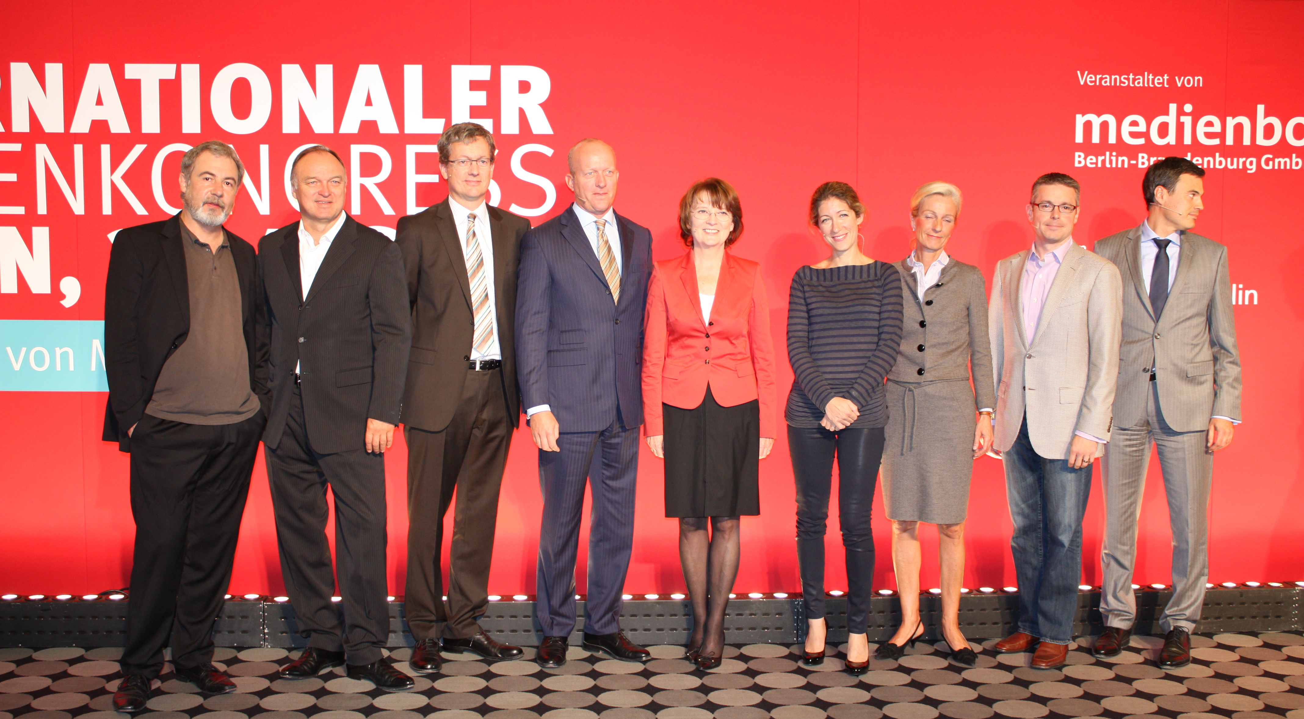 Internationaler Medienkongress im Rahmen der Internationale Funkausstellung 2012 Von links: ? - Elmar Giglinger, Thomas Ebeling, Marcel Düe, Conrad Albert, Dagmar Reim, Claire Tavernier, Sybille von Obernitz, Matthew Glotzbach, Norbert Himmler, - ?